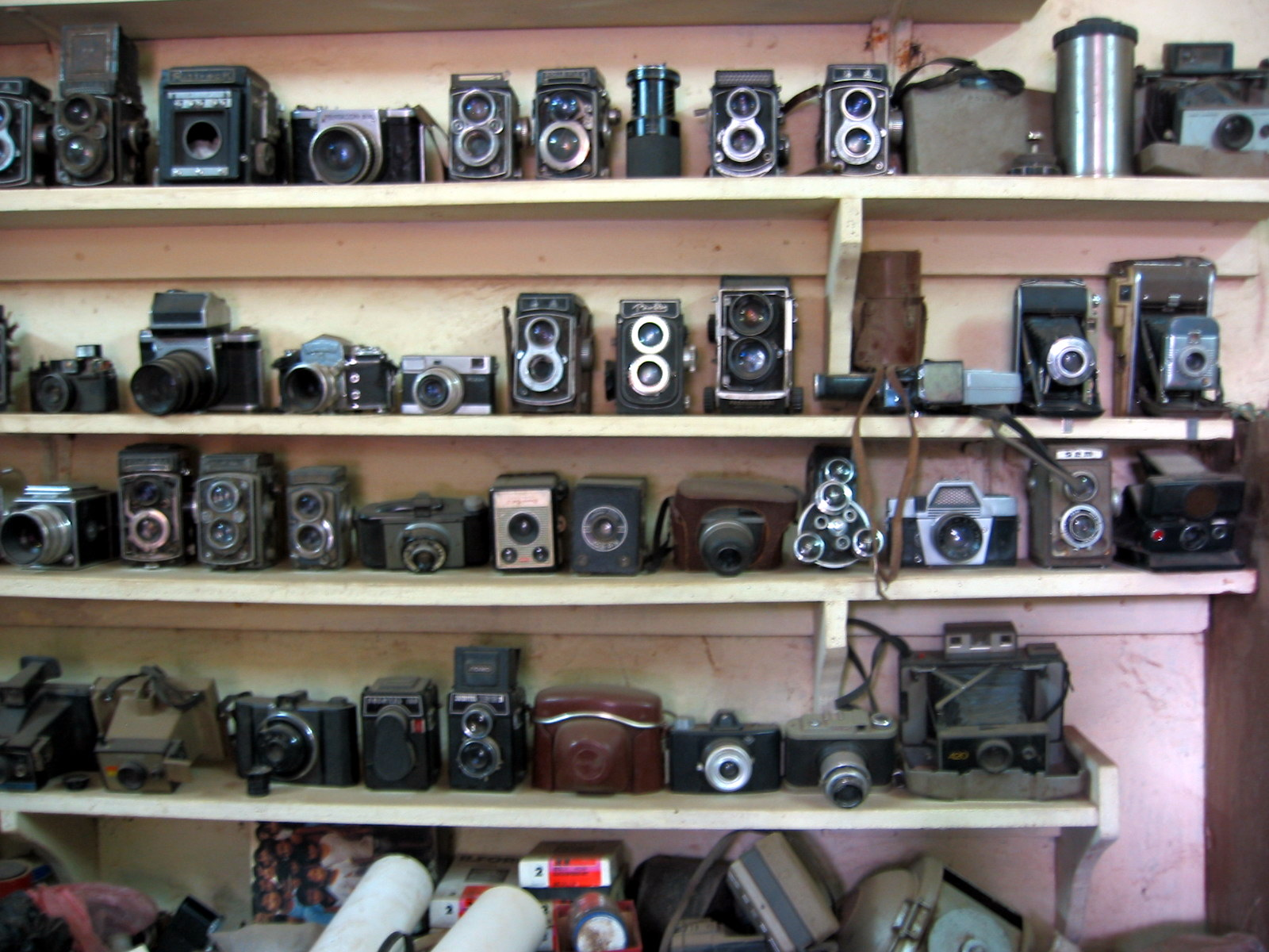 Malick Sidibe's studio, Bamako, Mali